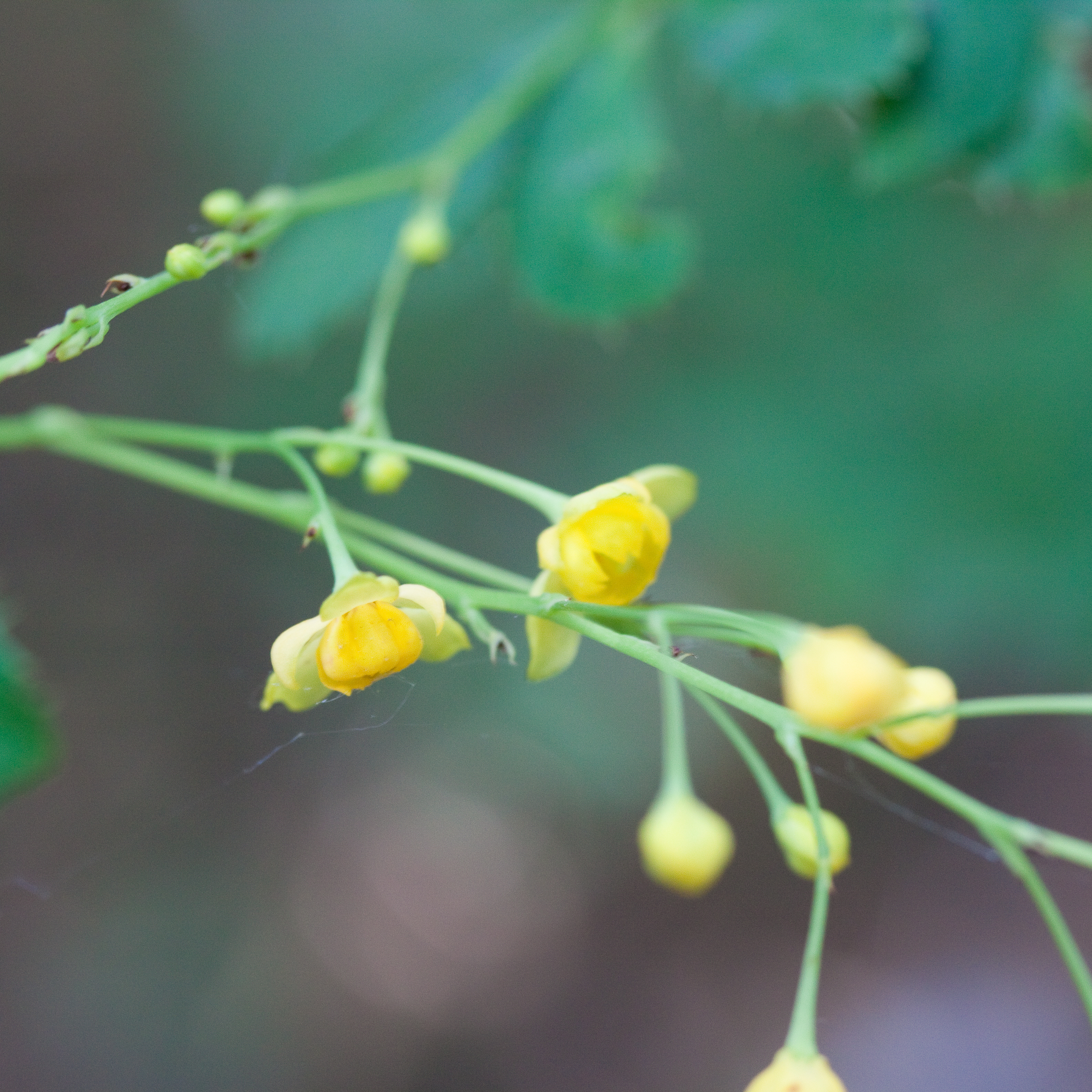 Fleurs de Berberis wilsoniae - Jardin botanique de Strasbourg - France